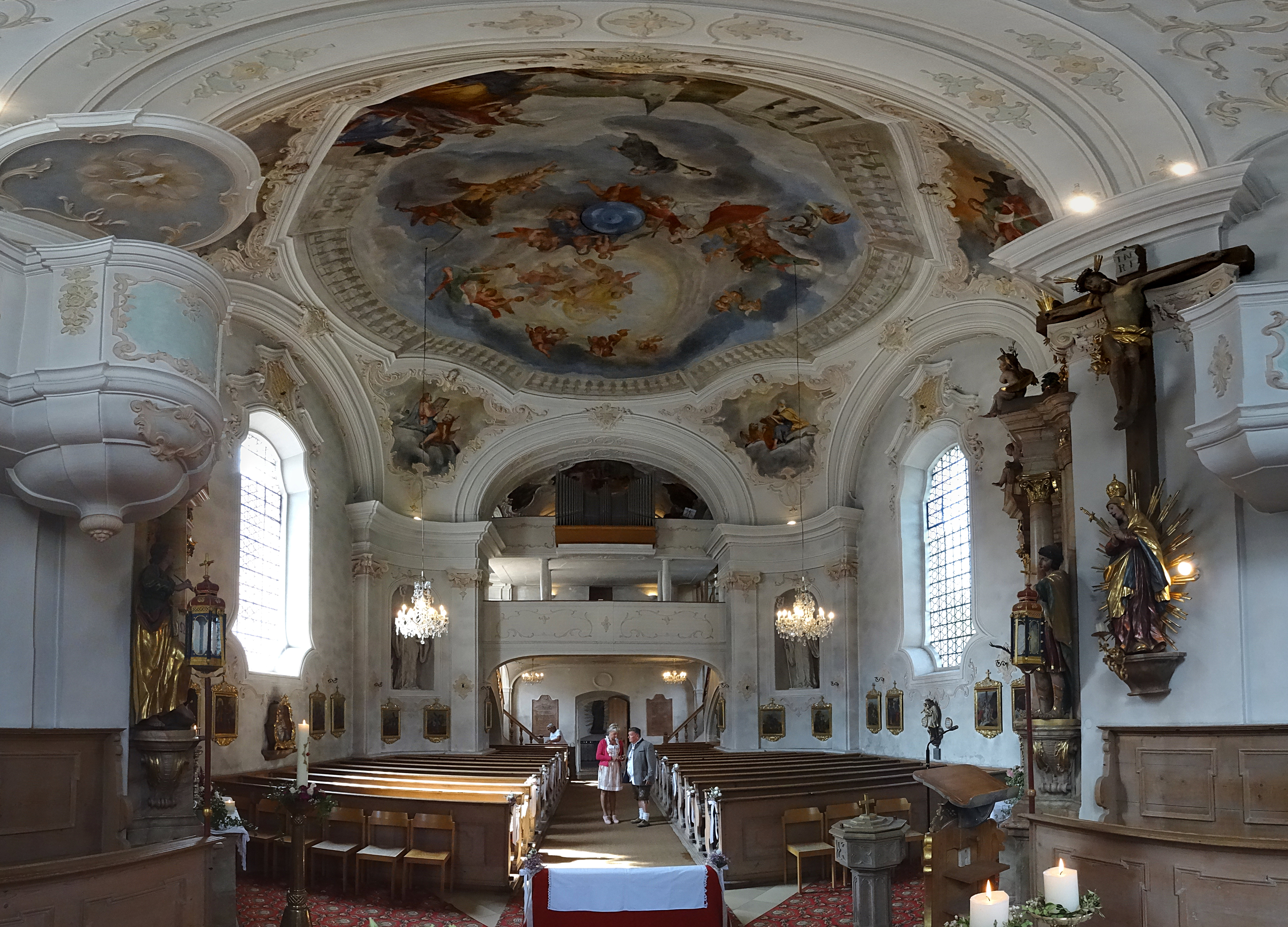 St. Margareth (Bayrischzell) mit Stuckkanzel (um 1740) von Thomas Glasl